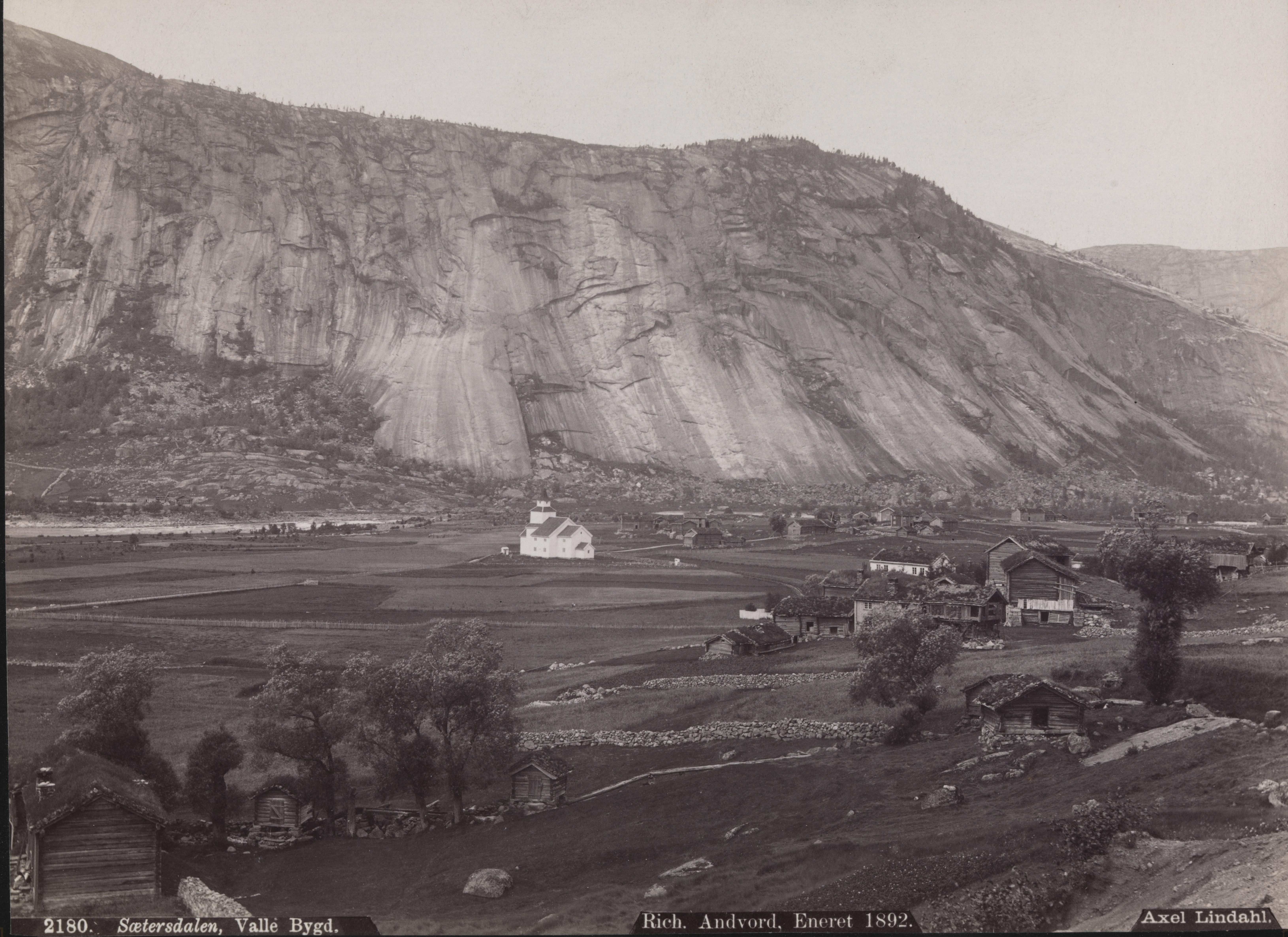 Bildet er hentet fra Nasjonalbibliotekets bildesamling. Beskåret for bedre visning.